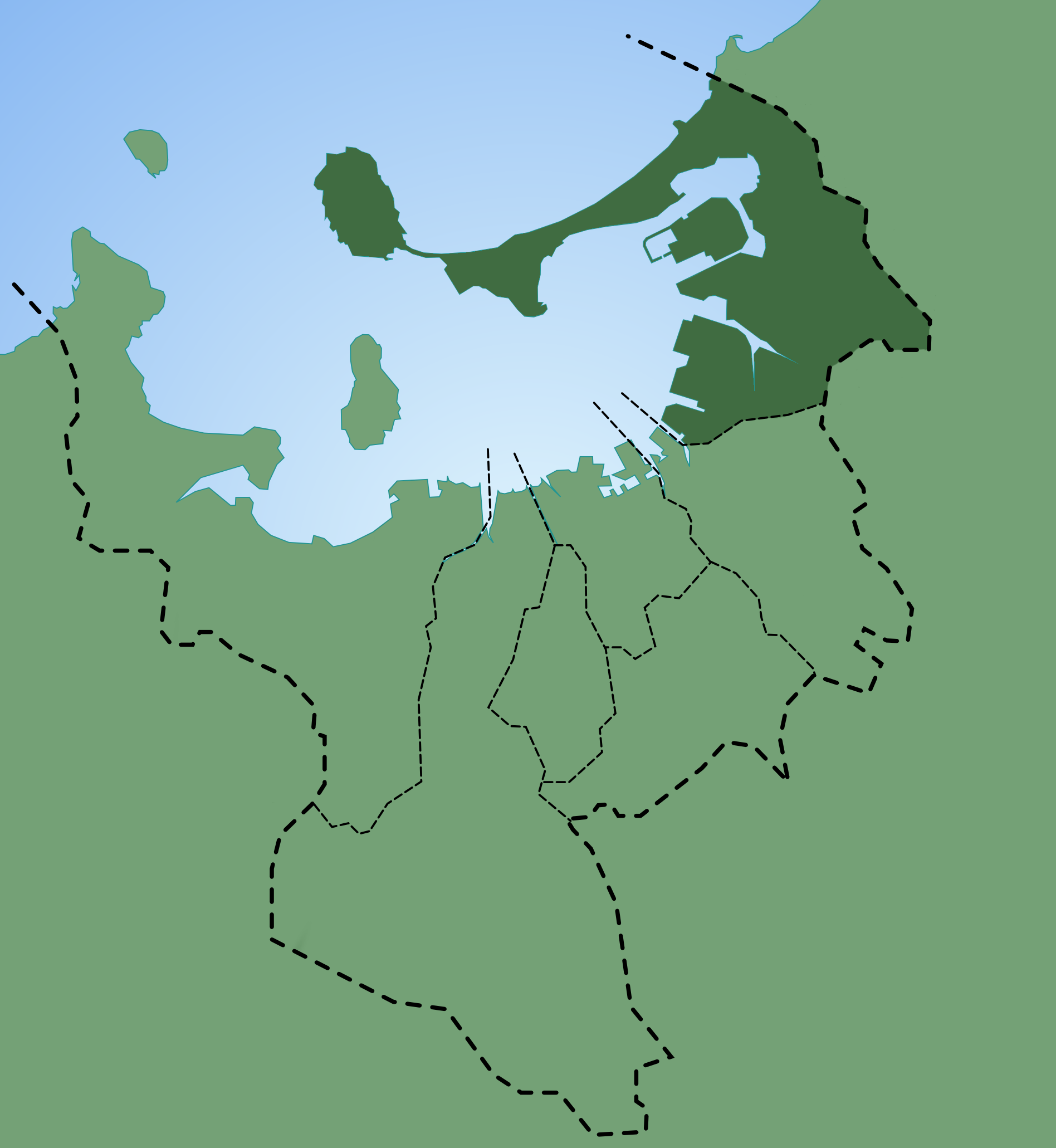 Higashi-ward of Fukuoka, Fukuoka in Japan.